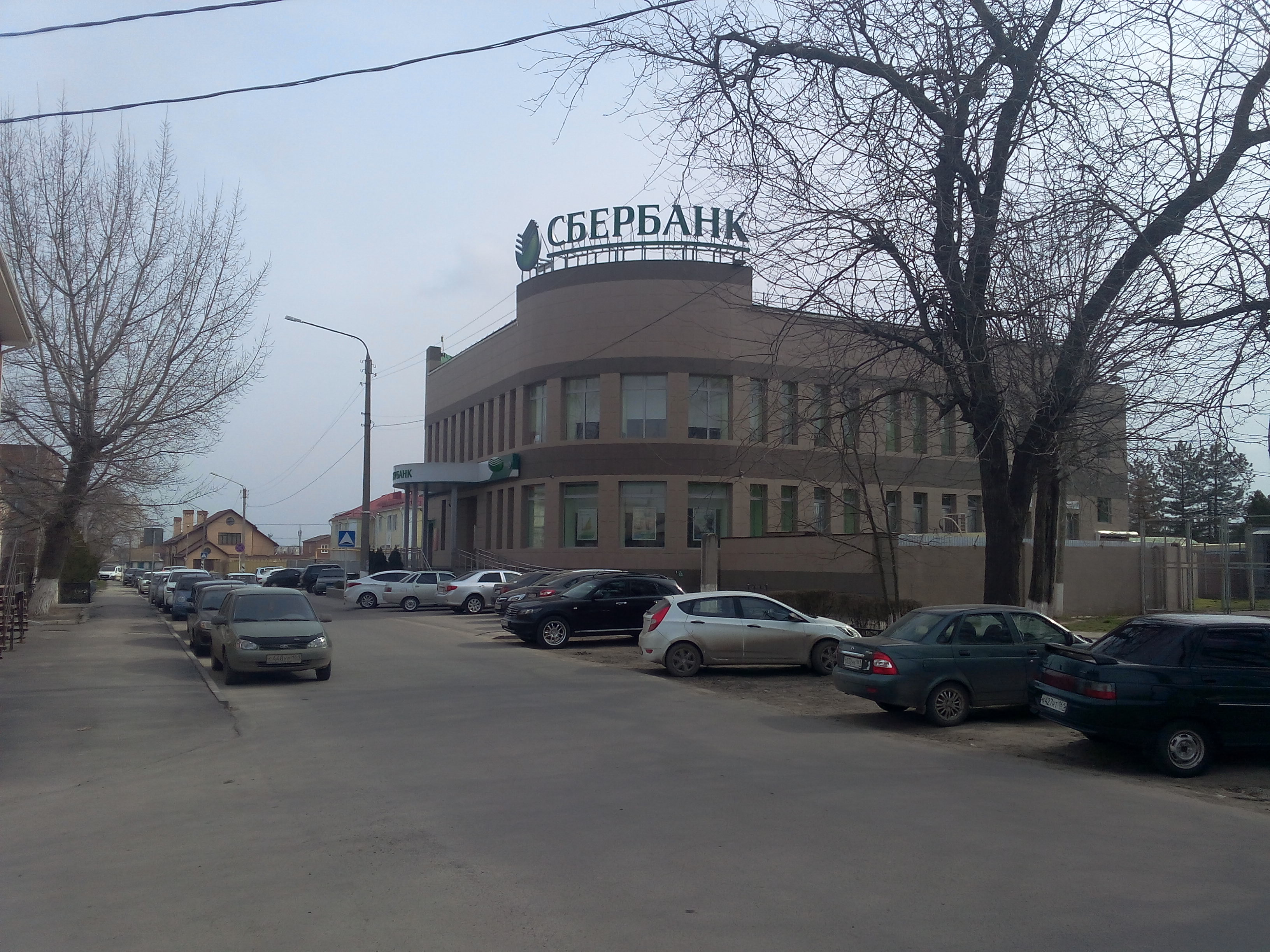 здание Сбербанка, г. Сальск, улица Кирова